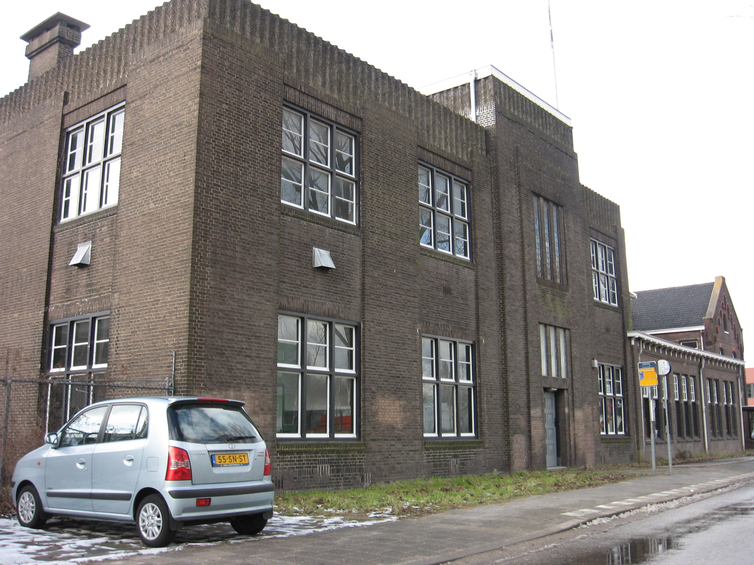 Delft - Voormalige Lijm- en Gelatinefabriek (Rotterdamseweg 270)